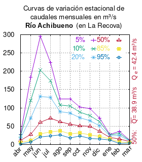 Curva de Variación Estacional Río Achibueno en la Recova. # cita publicación # | apellido = Dirección General de Aguas # | nombre = # | enlace-autor = Ministerio de Obras Públicas (Chile) # | título = Diagnóstico y clasificación de los cursos y cuerpos de agua según objetivos de calidad. Cuenca del río Maule # | ubicación = Santiago de Chile # | editorial = Ministerio de Obras Públicas (Chile) # | año = 2004 # | edición = # | url = # | ref = harv # Tabla 4.12: Río Achibueno en la Recova (m3/s) pág. 62 mes 5% 10% 20% 50% 85% 95% abr 27.954 23.361 18.573 11.342 4.918 2.003 may 184.127 119.598 71.561 28.228 10.885 7.310 jun 295.967 203.367 130.816 60.163 28.376 21.027 jul 223.416 173.899 128.377 71.875 35.180 23.123 ago 125.034 107.537 89.297 61.747 37.273 26.169 sep 123.982 105.475 85.592 54.800 28.698 18.569 oct 101.715 87.871 73.439 51.641 32.277 23.491 nov 97.631 78.233 64.720 49.100 26.800 16.000 dic 72.340 62.221 51.672 35.739 21.585 15.163 ene 28.024 25.913 23.460 19.194 14.703 12.434 feb 36.458 30.602 24.497 15.277 7.086 3.370 mar 12.452 11.272 9.921 7.623 5.317 4.216 This plot was created with Gnuplot.